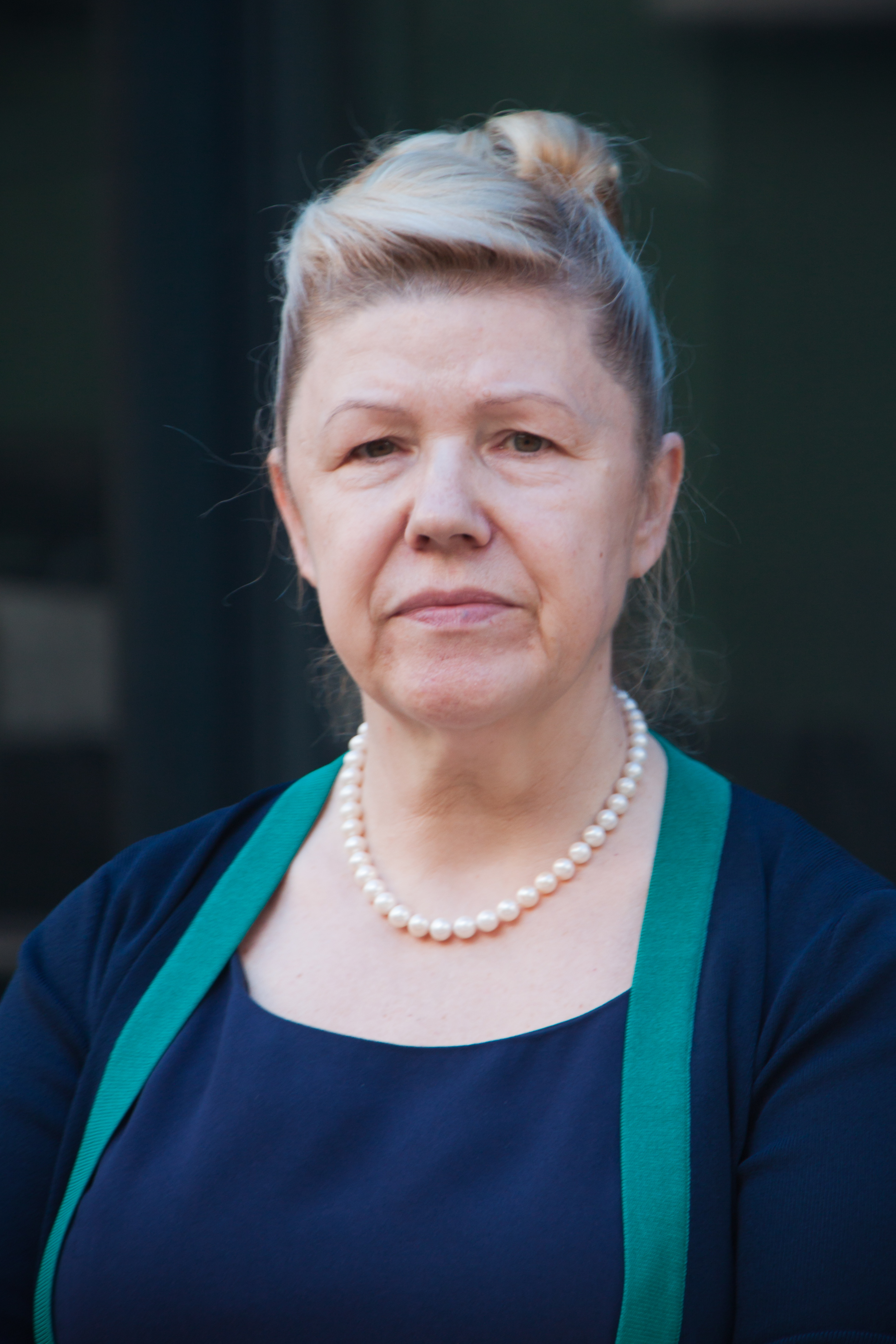 Депутат Государственной думы РФ от фракции "Справедливая Россия" Елена Мизулина